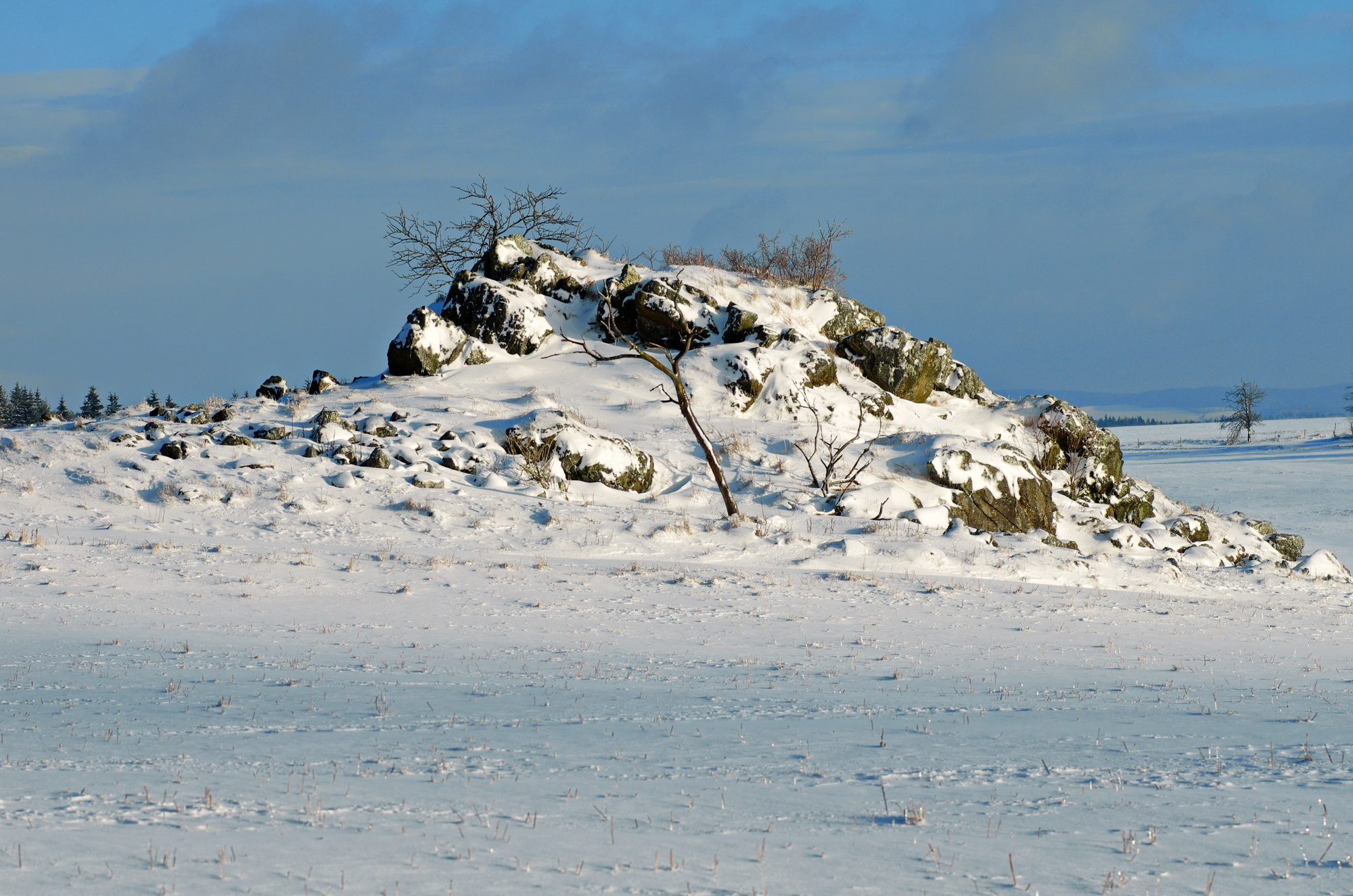 Evropsky významná lokalita Pramenské pastviny, Slavkovský les, okres Cheb